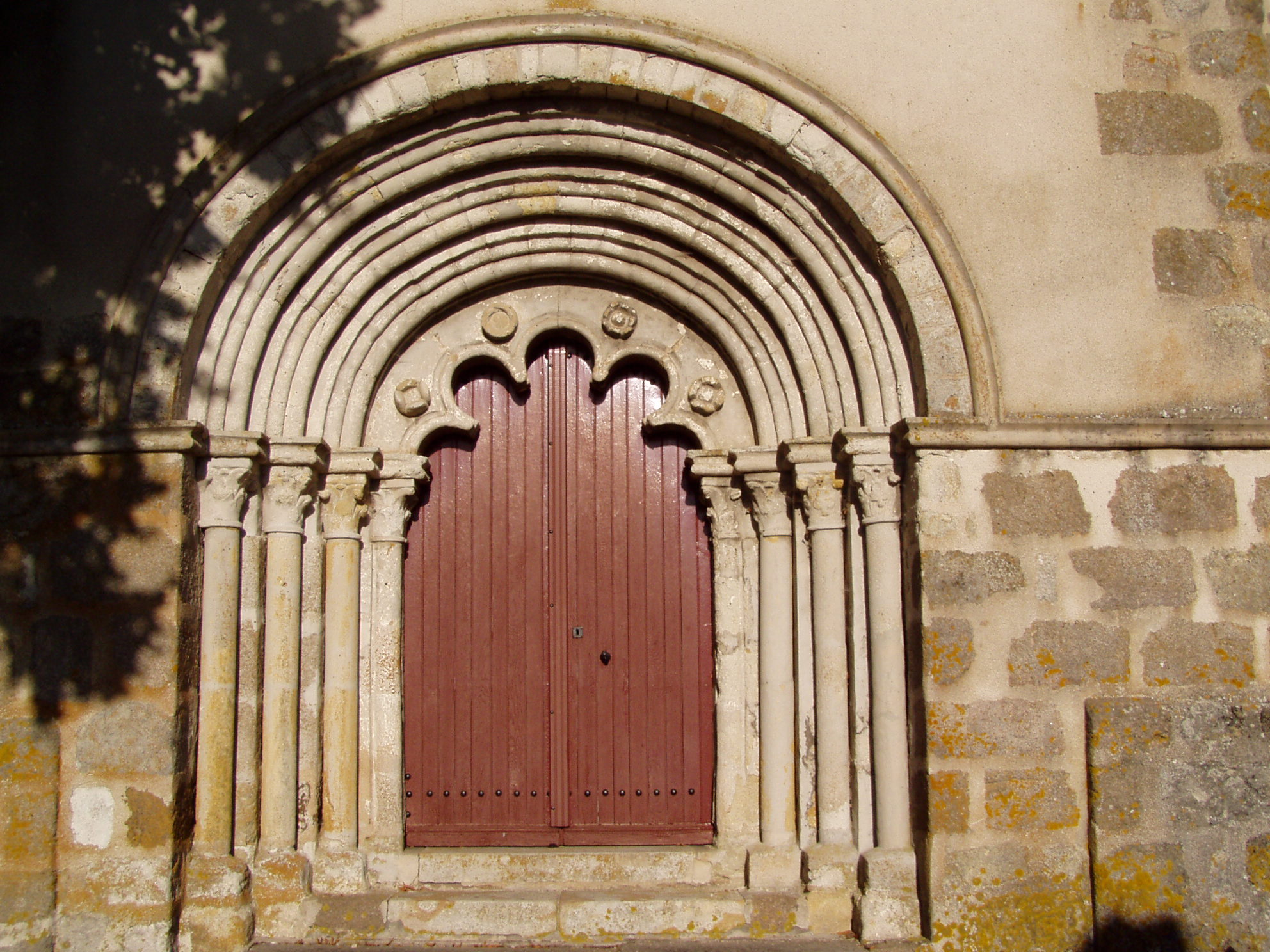 Portail de l'église de Saint-Bonnet-de-Four dans l'Allier (France)